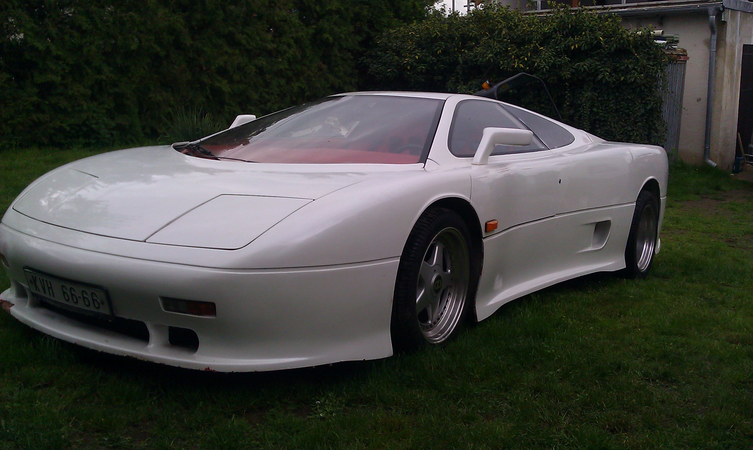 2. prototyp MTX Tatra V8 , stav vozu v roce 2013